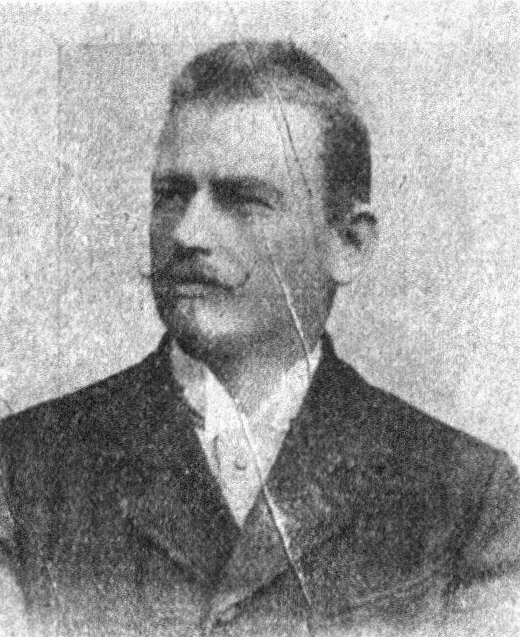 Österreichischer Politiker, Reichsratswahl 1907, Name siehe Dateiname